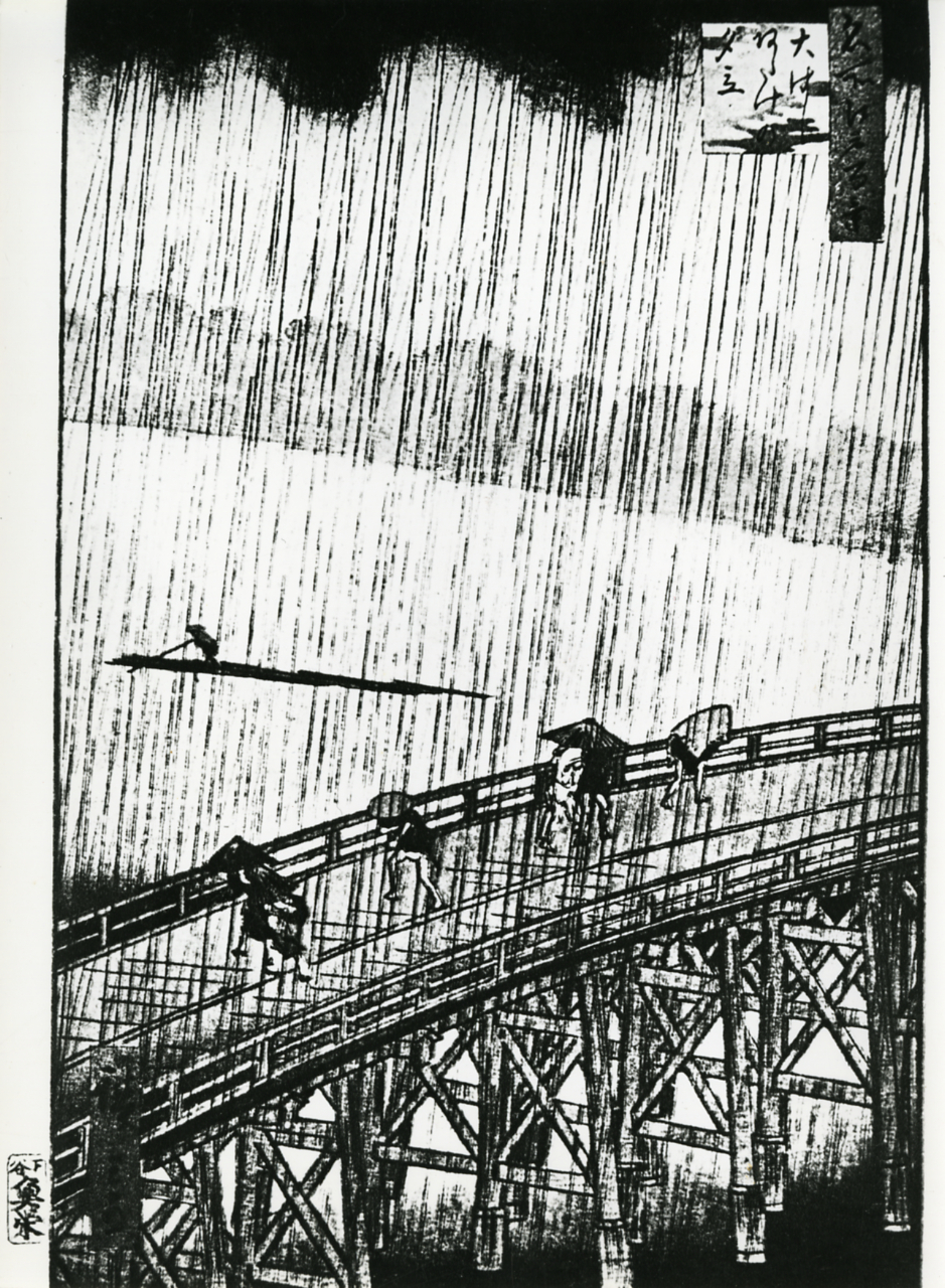 Servizio fotografico : Italia, 1975 / Paolo Monti. - Stampe: 3 : Positivo b/n, gelatina bromuro d'argento/ carta, 24x30. - ((Al verso delle stampe iscrizione didascalica e documentaria manoscritta a matita: "Italia '61". - Sul coperchio della scatola iscrizione didascalica manoscritta a pennarello nero: "Scanno Tremiti".